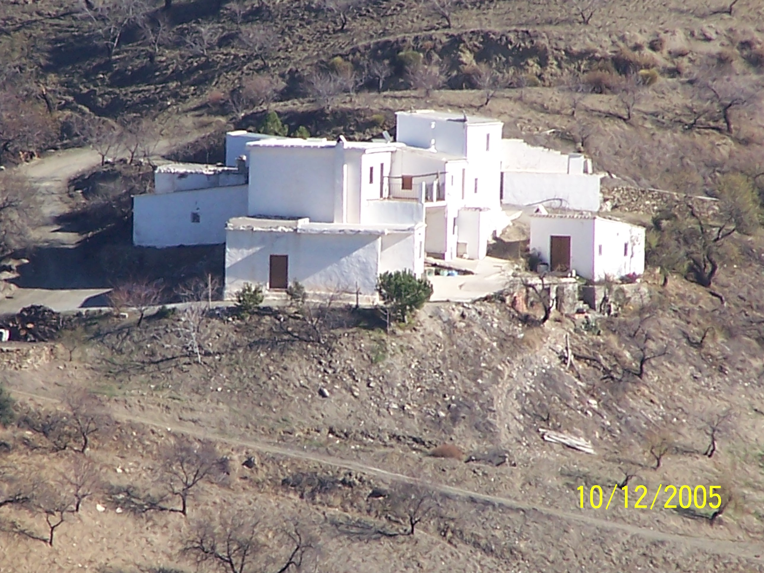 Cortijada en la Loma de la Señora, Almegijar, Granada